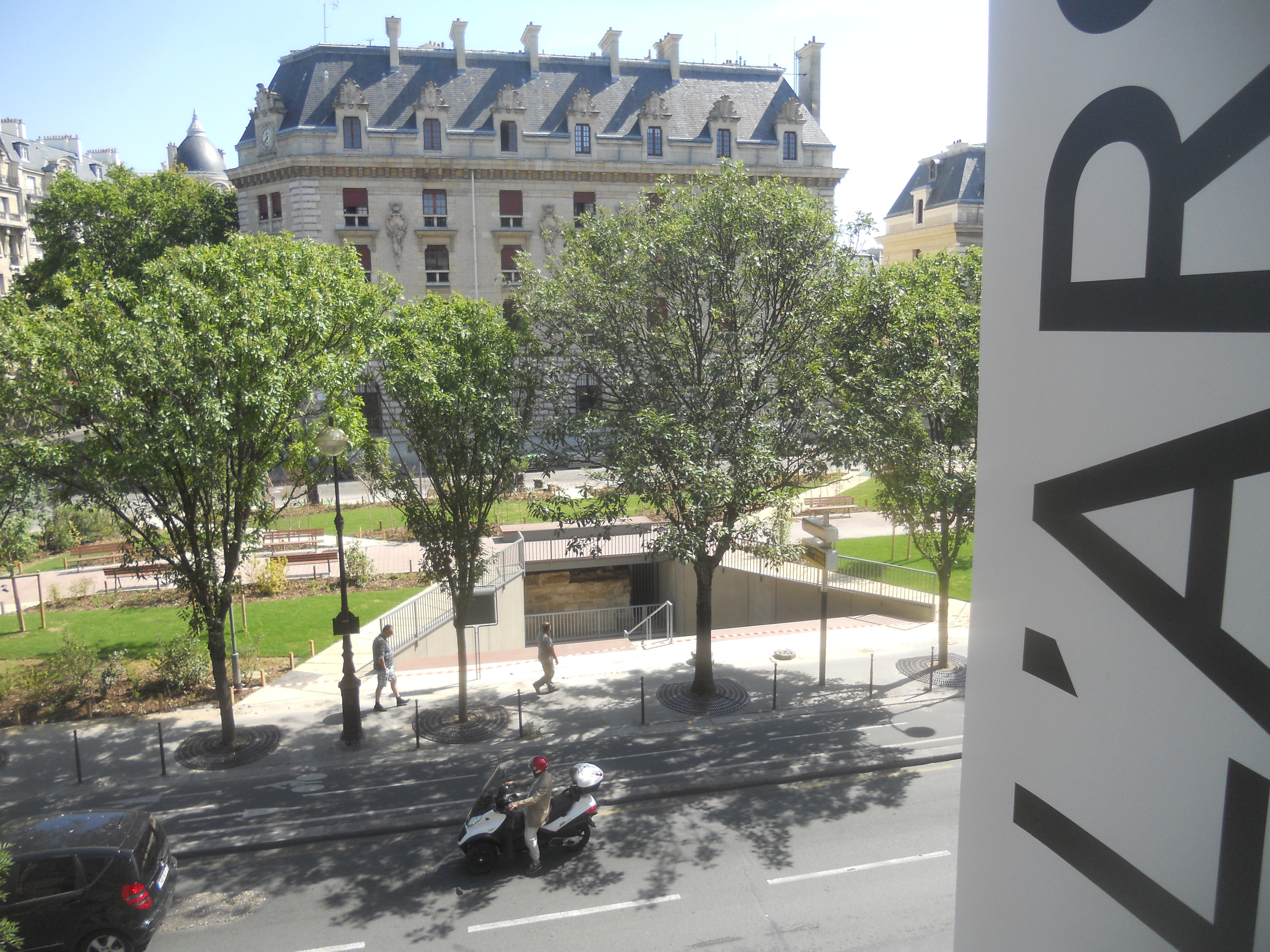 4 septembre 2019